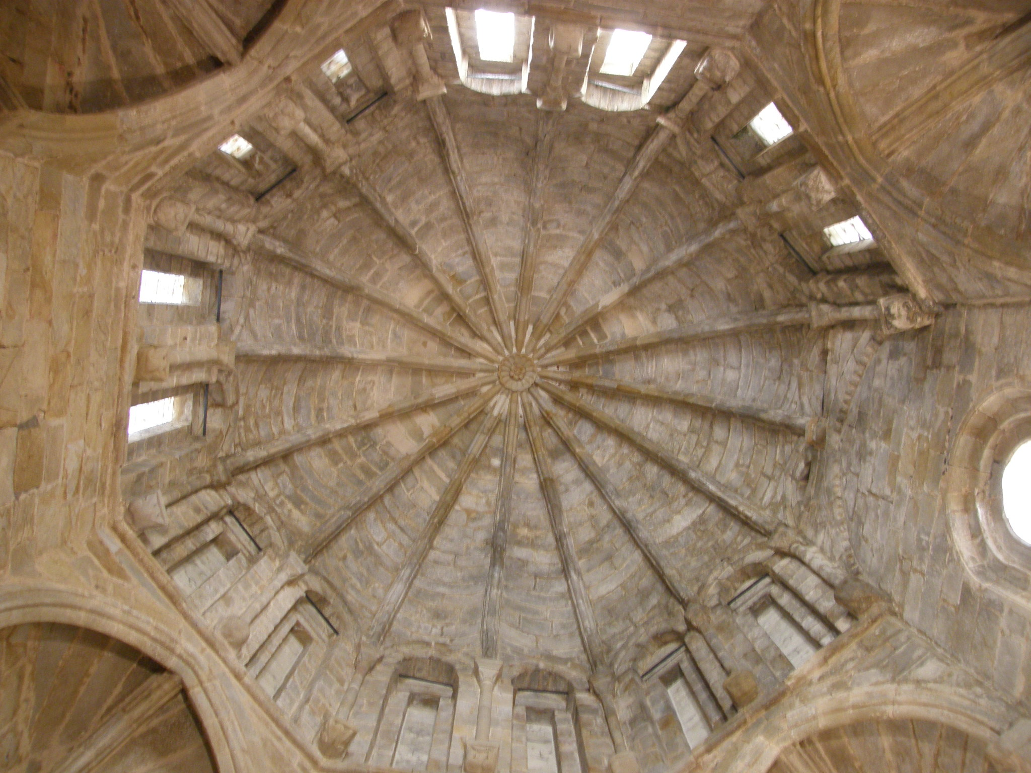 Interior del Cimborrio de la Catedral de Plasencia. Presenta planta octogonal en el arranque de la cúpula. Los nervios de la bóveda suben a través de columnitas con pequeños capiteles.